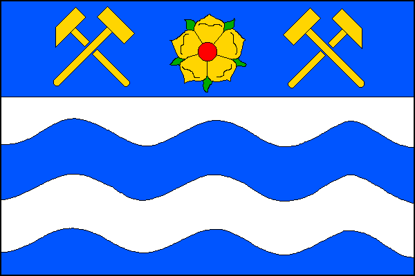 Prapor statutárního města Havířova